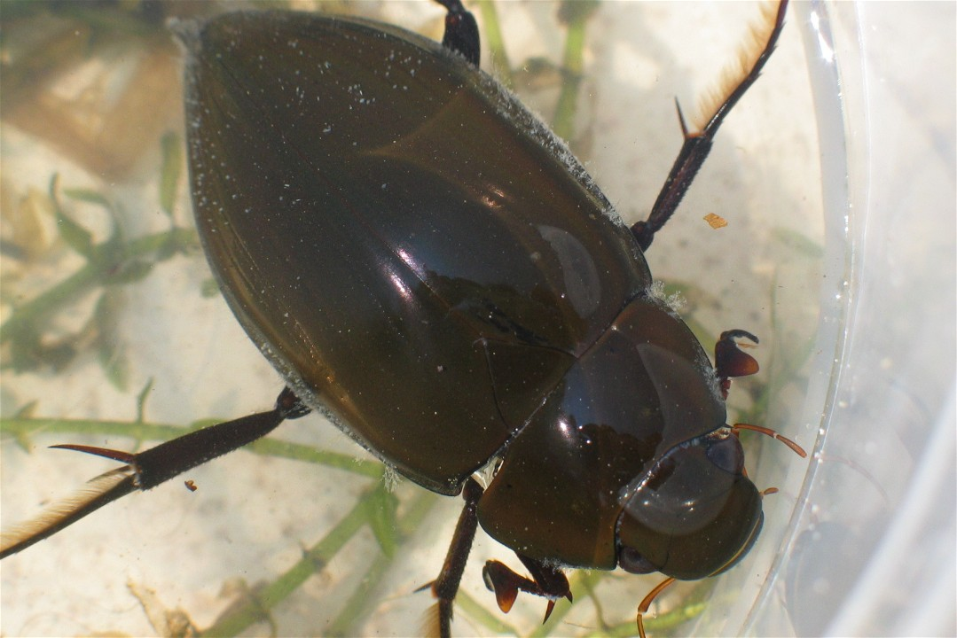 Großer Kolbenwasserkäfer (Hydrophilus piceus)